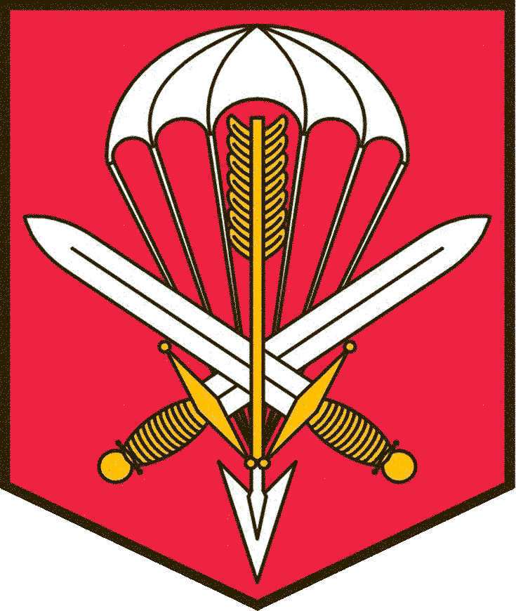 Znak 601. skss